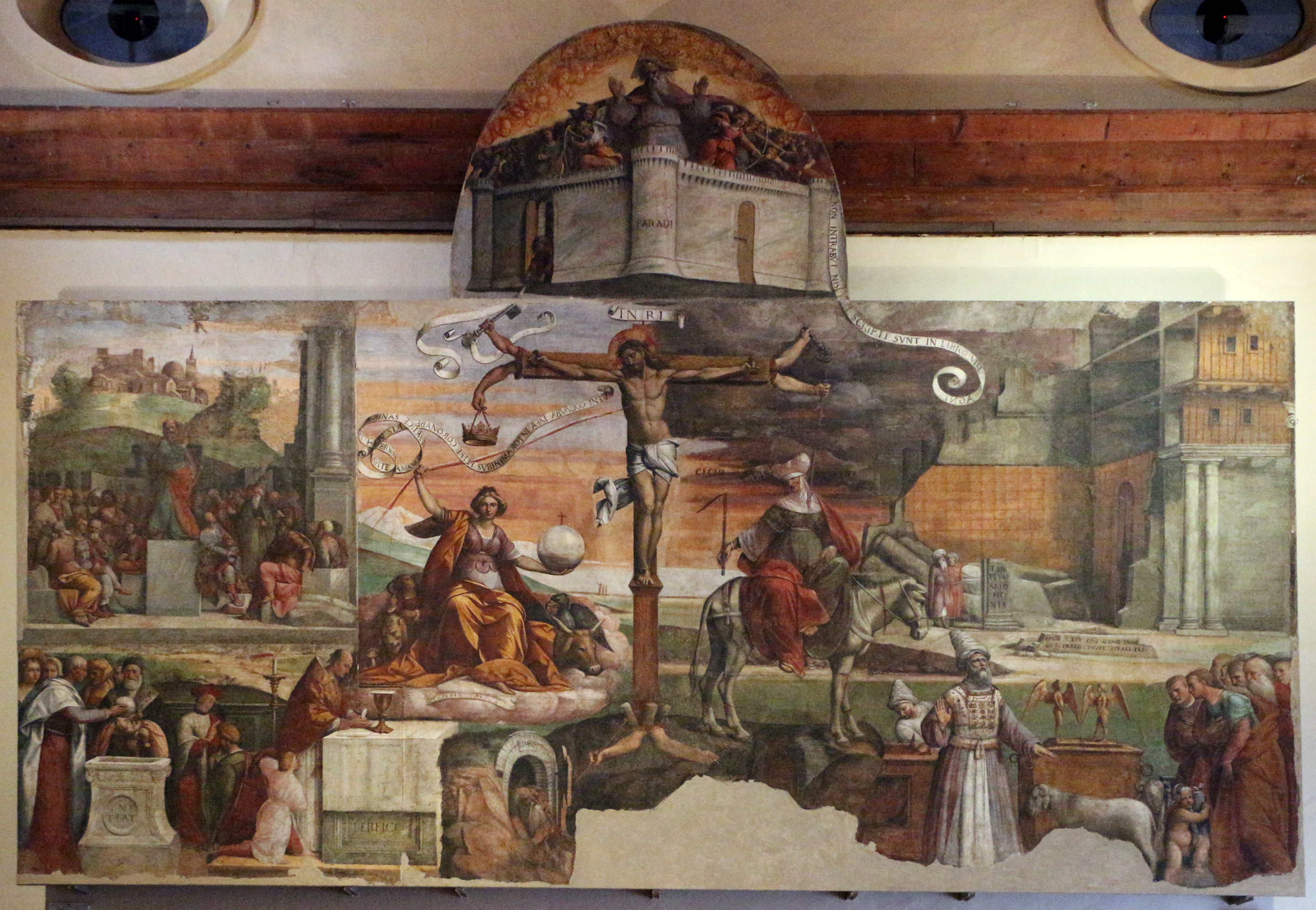 Palazzo dei Diamanti (Ferrara) This is a photo of a monument which is part of cultural heritage of Italy.